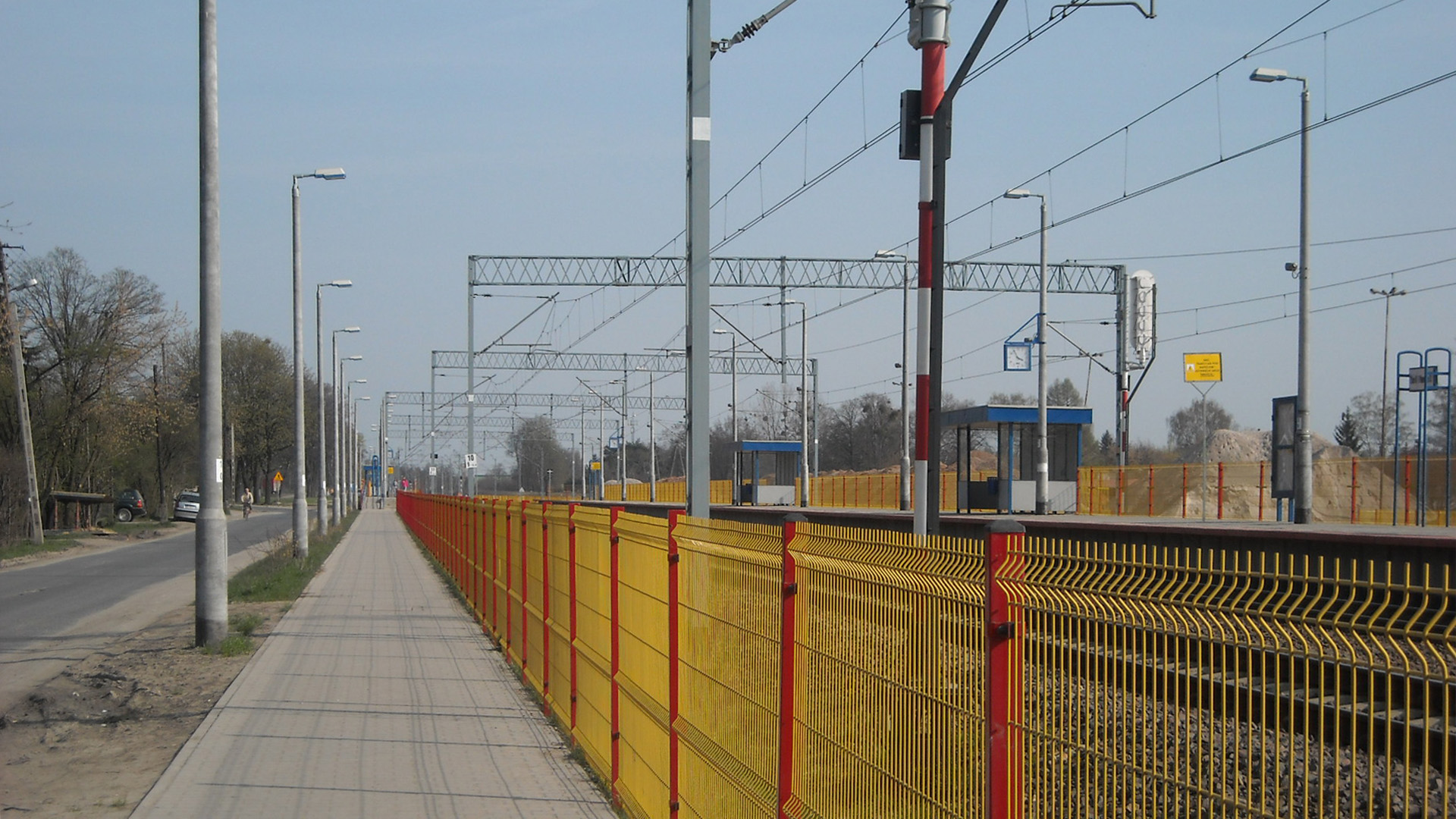 Przystanek kolejowy w Andrzejowie